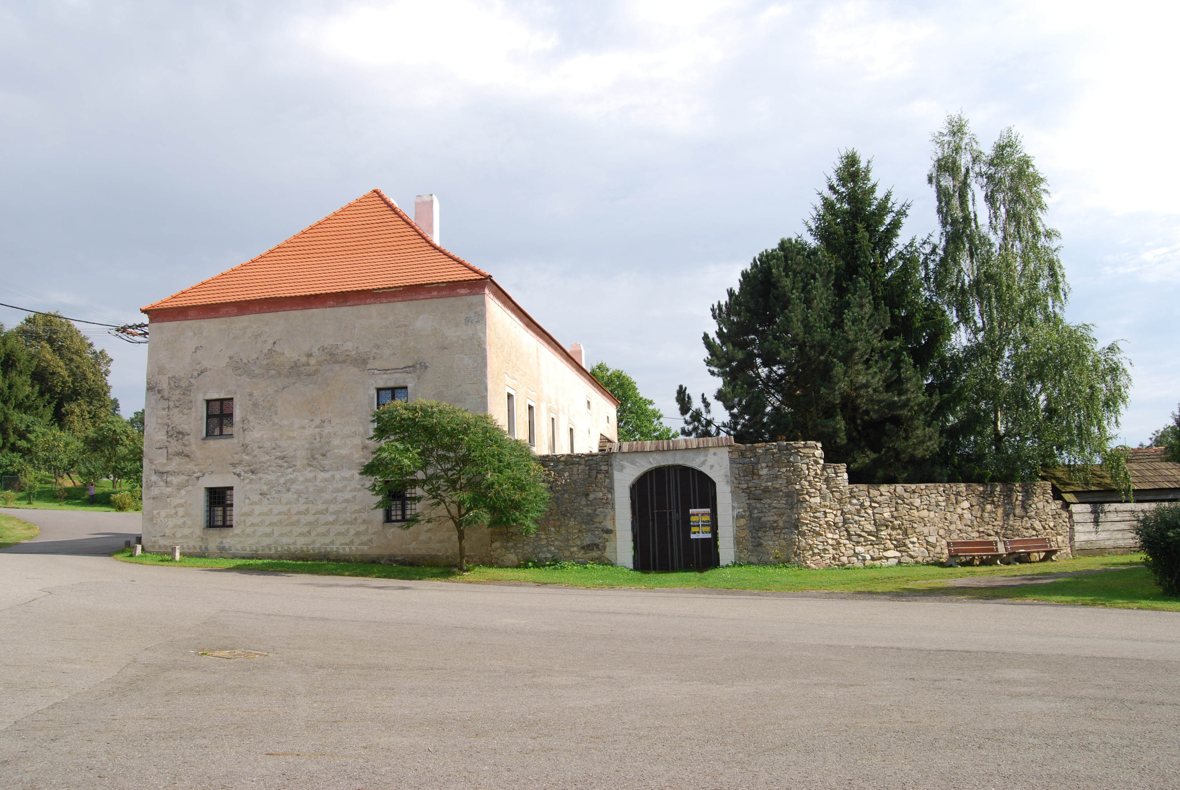 Tvrz v obci. Vlksice (okres Písek). Česká republika.